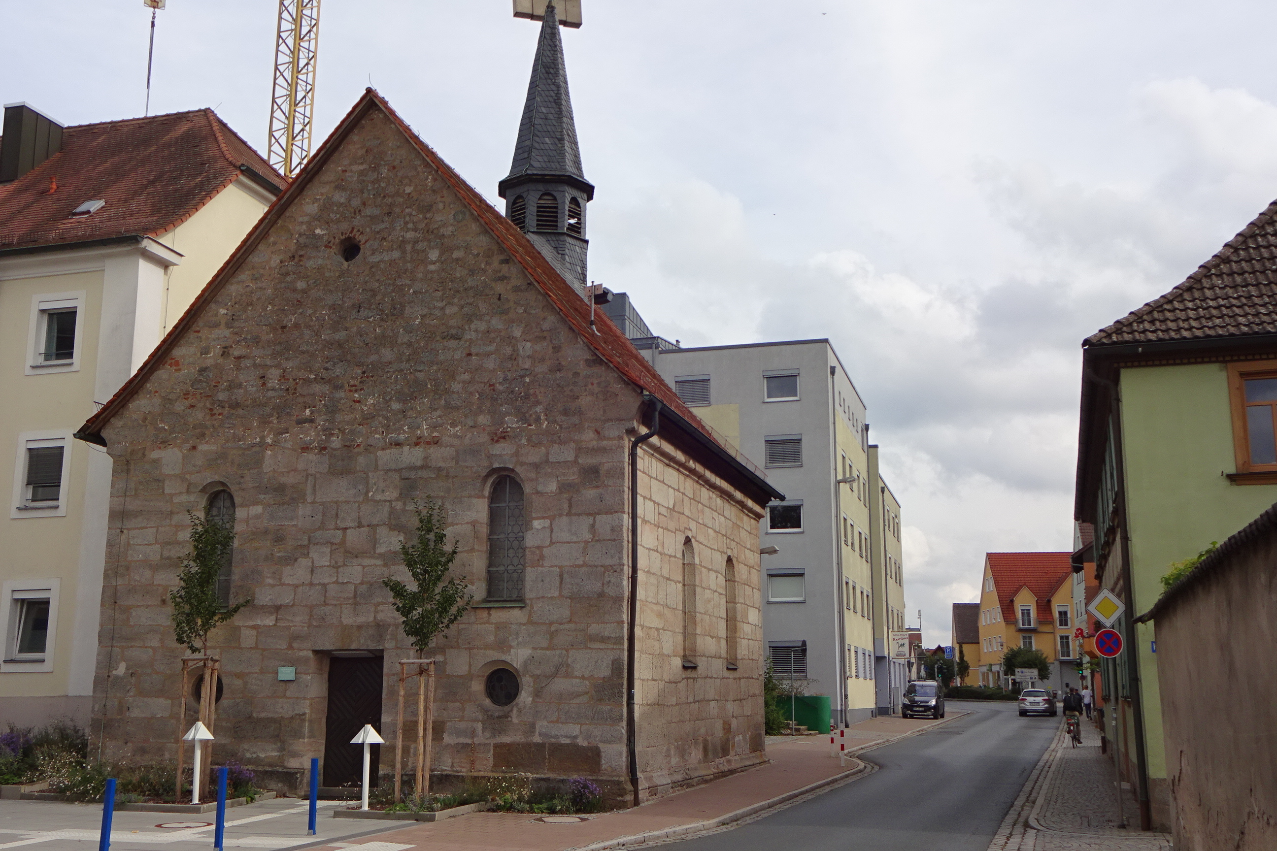 Spital Kirche St. Anna von 1513 in Höchstadt. Gestiftet vom Chorherren Michael Koslinger. 1648 im Barock Stil im Innenraum erneuert.